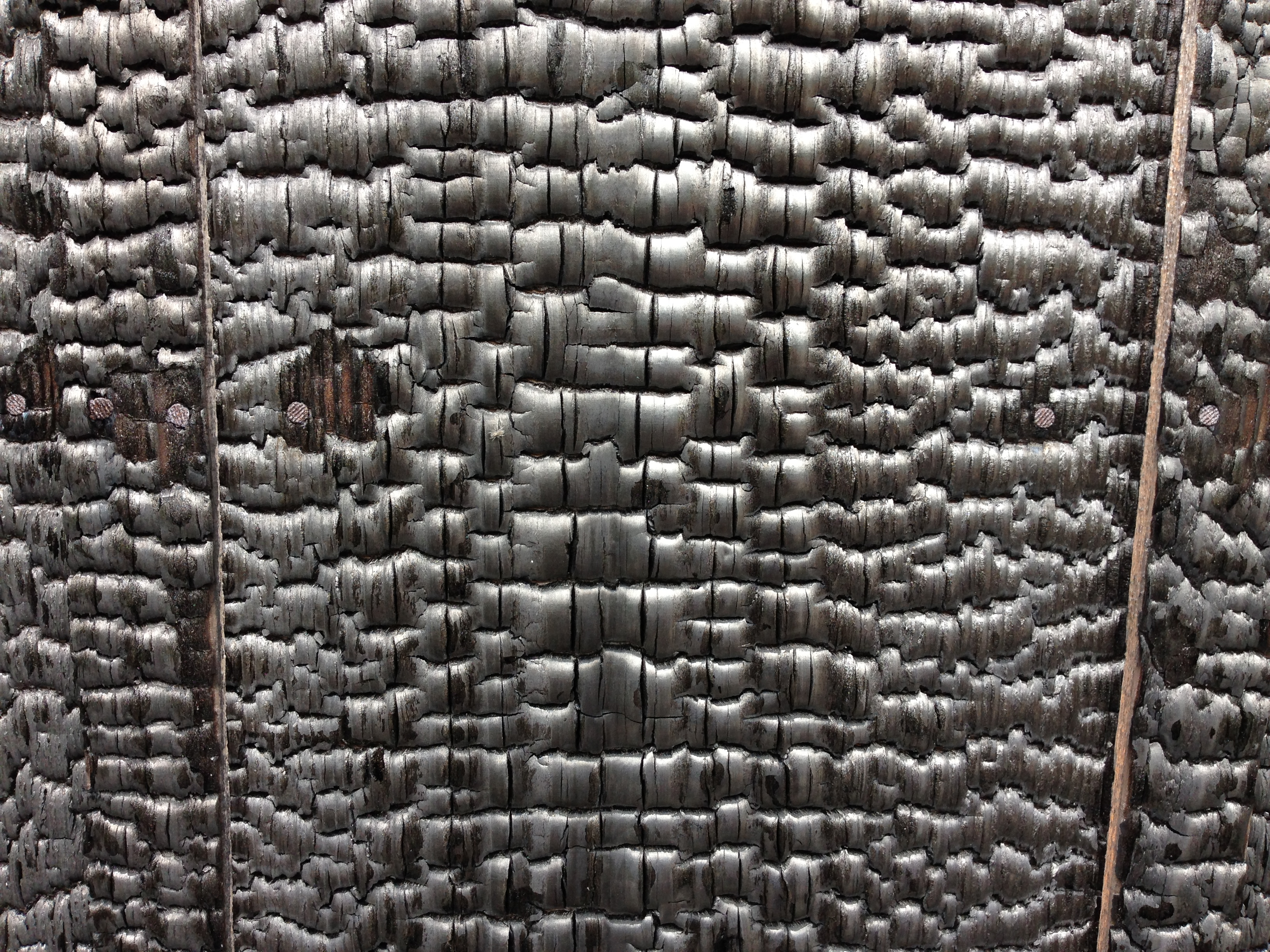 家屋に使用される焼杉板の表面